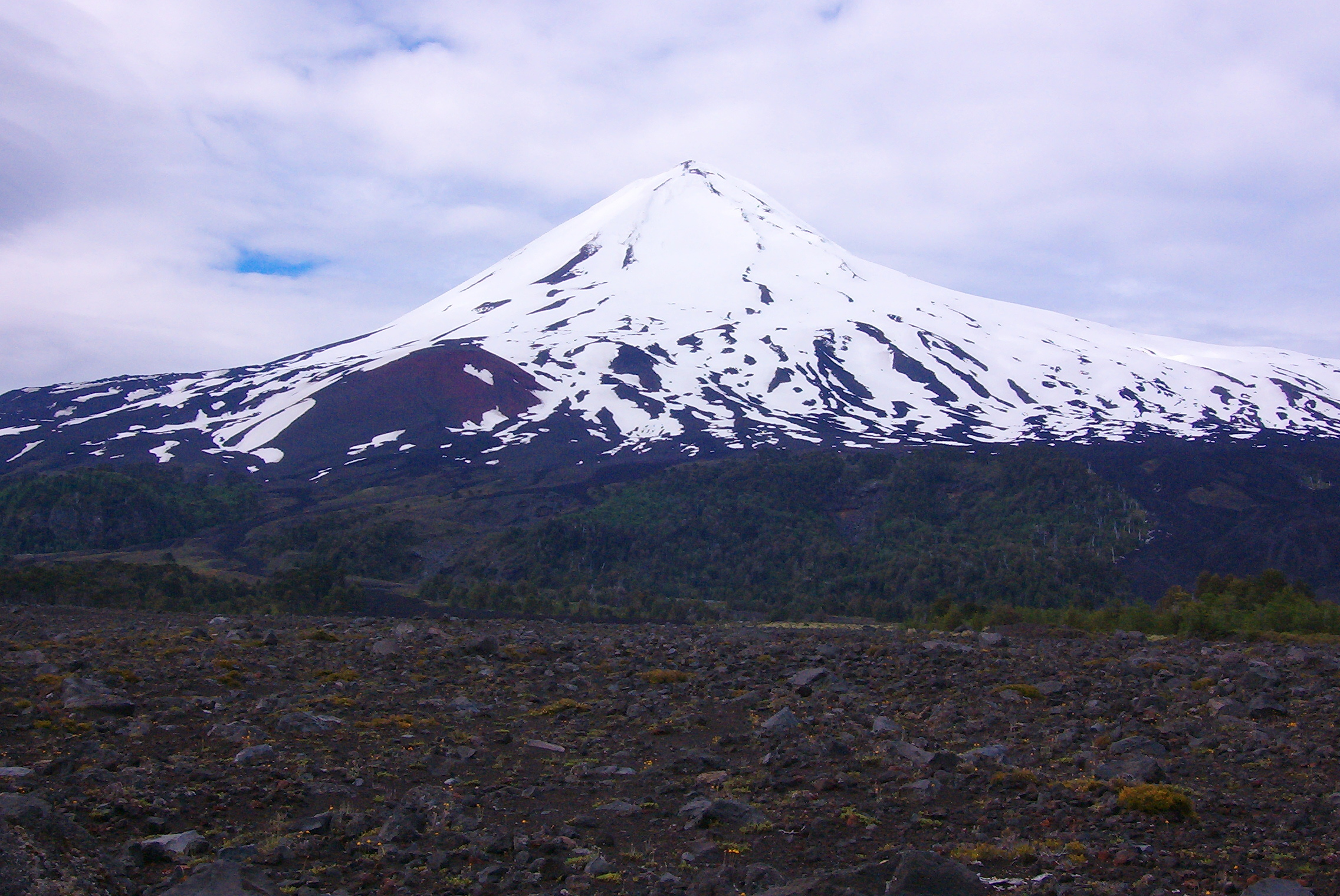 Llaima Volcano, Chile.